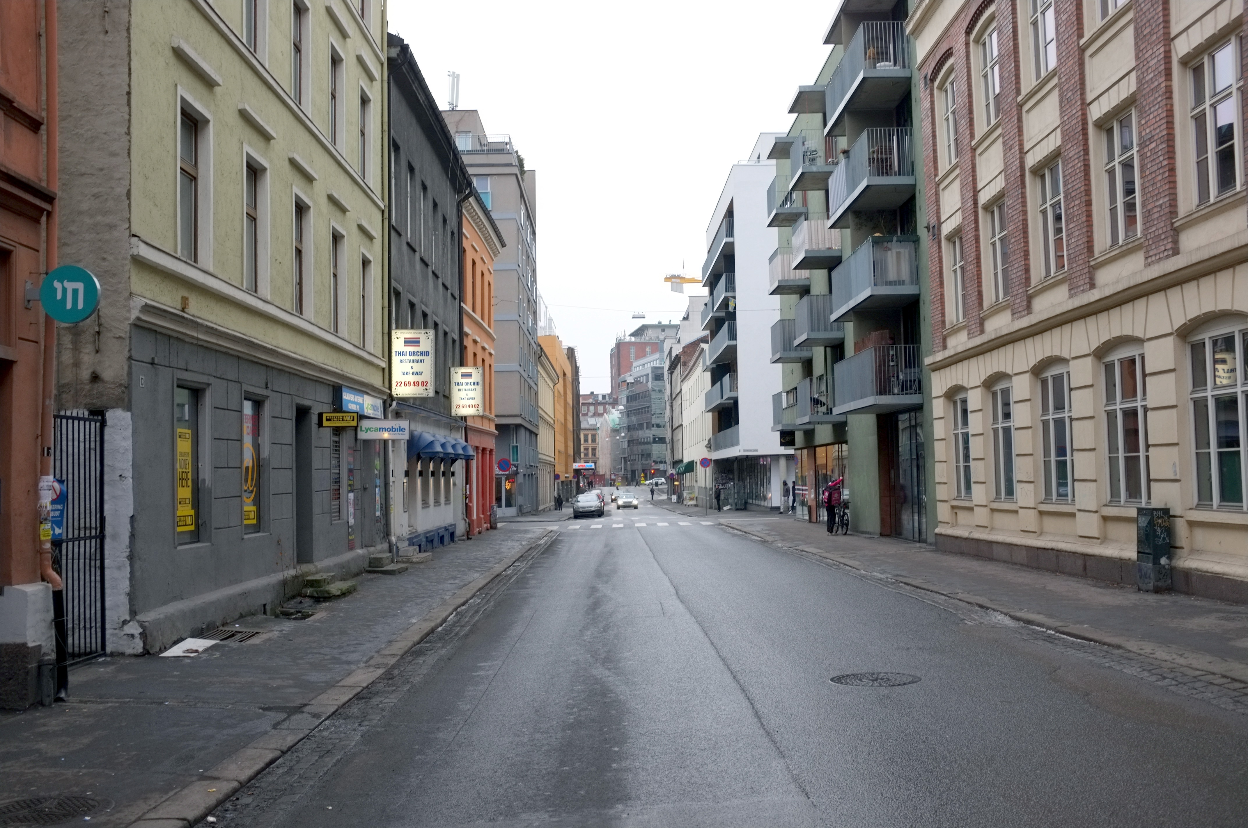 Calmeyers gate i Oslo.